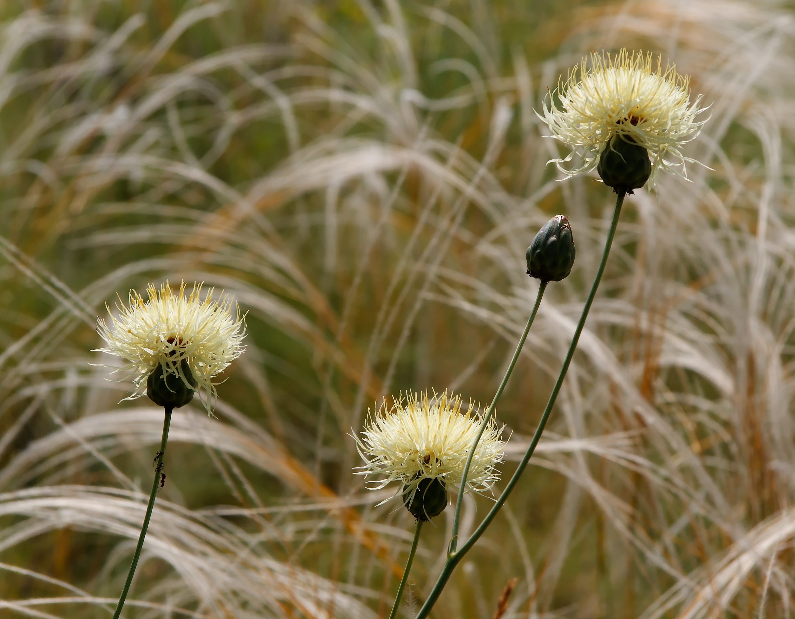 Rhaponticoides ruthenica (Centaurea ruthenica)